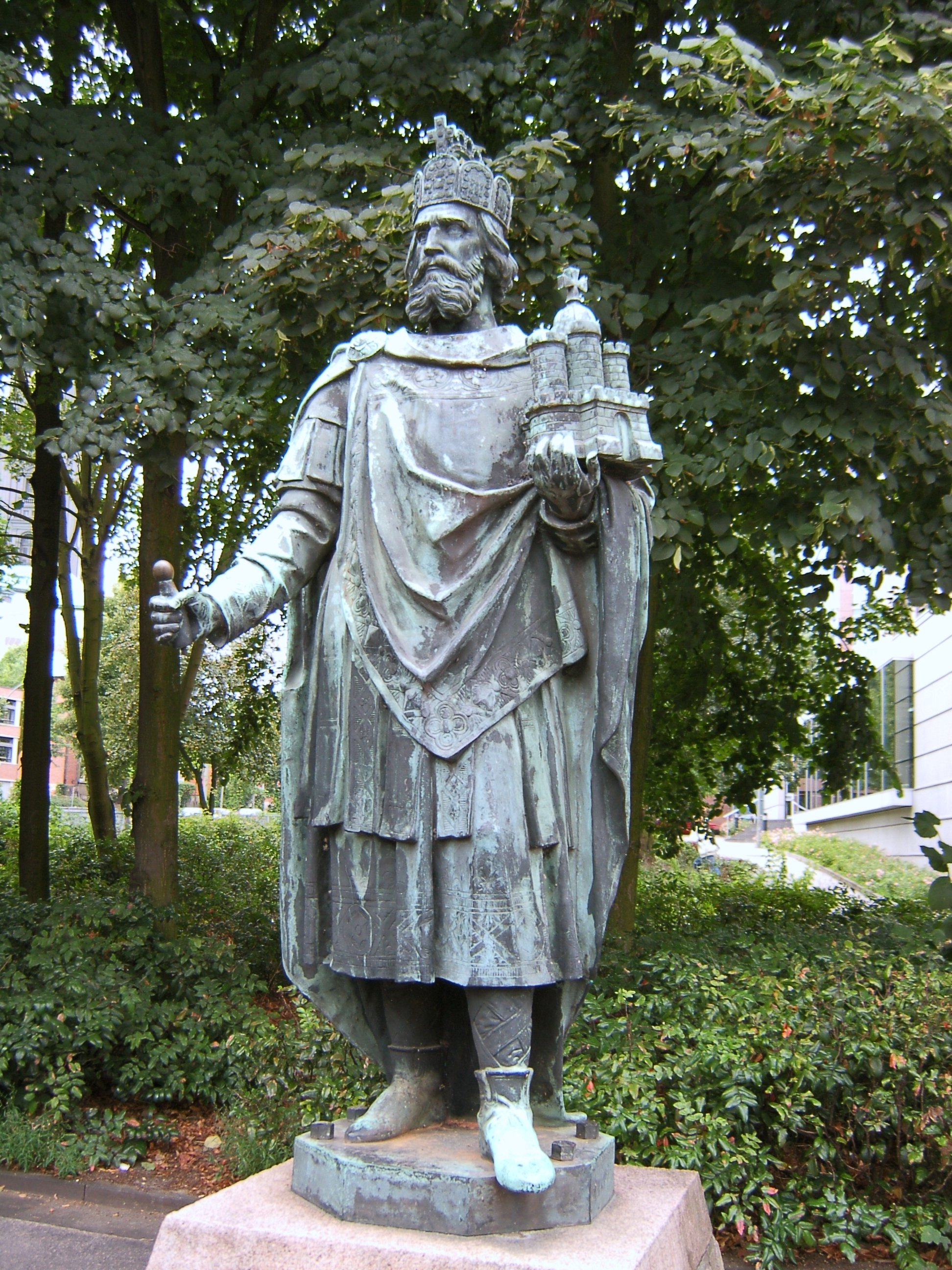 Die Statue Karls des Großen vor der St.-Ansgar-Kirche in der Hamburger Neustadt wurde 1889 von Engelbert Peiffer (1830-1896) geschaffen. Sie zeigt Karl mit der Reichskrone, in der Hand die dem Hamburger Wappen nachgestaltete Hammaburg, als Gründer der Stadt. Die Statue stand zunächst am Alten Fischmarkt und steht als Kopie von 1926 (das Original wurde im Ersten Weltkrieg eingeschmolzen) seit 1977 am heutigen Standort. Ergänzung nach Schütt "Die Chronik Hamburgs", Studt/Olsen "Geschichte Hamburgs" und eigene Anschauung: Die Bronzefigur bildete den Mittelpunkt einer Brunnenanlage am Fischmarkt in Hamburg-Altstadt (am heutigen "Domplatz" - wo auch die auf bestreben von Karl dem Großen errichtete Taufkirche und Hammaburg vermutete wurde) die von Johannes Vollmers gestaltet wurde. Der Kaiser-Karl-Brunnen wurde am 13. November 1889 eingeweiht. Die Brunnenanlage aus Backstein hatte in der Mitte eine mehrere Meter hohe Säule die mit Glasmosaikbildern von Bischof Adalbert, Graf Adolf IV (Schauenburg), Dr. Albert Krantz, Dietmar Koel und 4 Löwen (Bronze mit Wappen) geschmückt war und auf deren Spitze der Kaiser stand. Nach Studt/Olsen wurden die Figur und die Löwen des Kaiser-Karls-Brunnen 1940 abgebaut. Nach Schütt wird das Kunstwerk 1941 durch Bomben beschädigt und dann erst abgebaut. Die Figur (sie steht nun fast zu ebener Erde - offensichtlich fehlt das Schwert in der rechten Hand) und die im Halbkreis aufgestellten Löwen stehen nun vor dem "Kleinen Michel" Michaelisstraße. This is a photograph of an architectural monument.